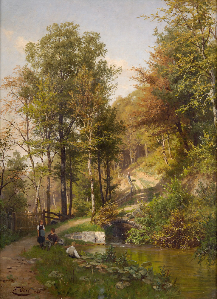 Spätsommertag. Signiert. Datiert 1885. Öl auf Leinwand, 95 x 71 cm